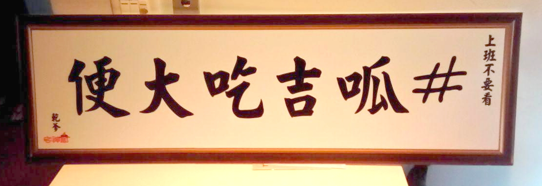 《上班不要看》的「#呱吉吃大便」牌子，左下角標示贊助商為彩得線上娛樂「宅神爺」遊戲平台。